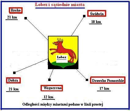 Łobez i sąsiednie miasta1